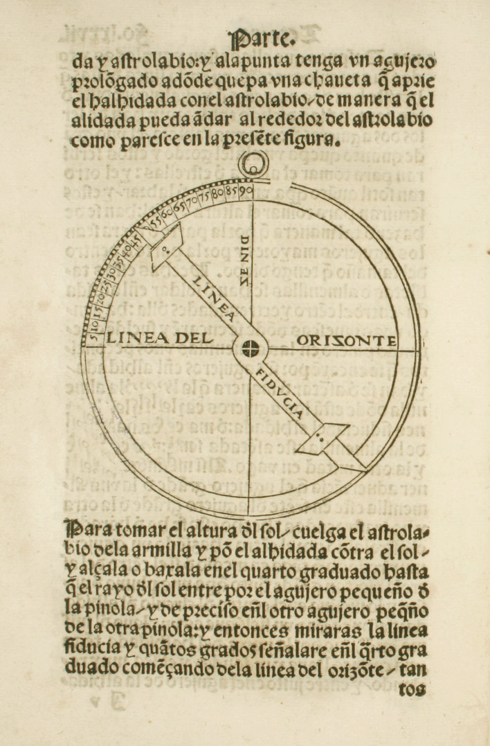 Astrolabe nautique : première représentation imprimée.